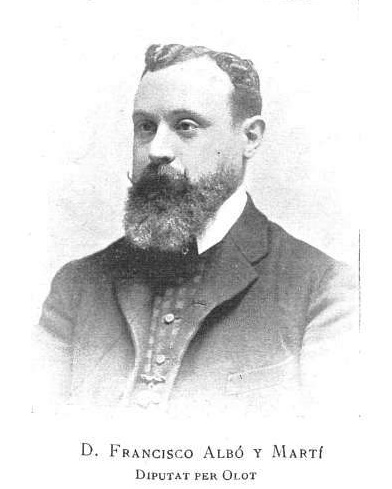 Francisco Albó y Martí, La Ilustració Catalana, Barcelona, 20 de mayo de 1906, año IV, n.º 155. La fotografía apareció también en el folleto "Solidaritat Catalana (Recort de las festas del homenatge), Barcelona 20 de maig de 1906".